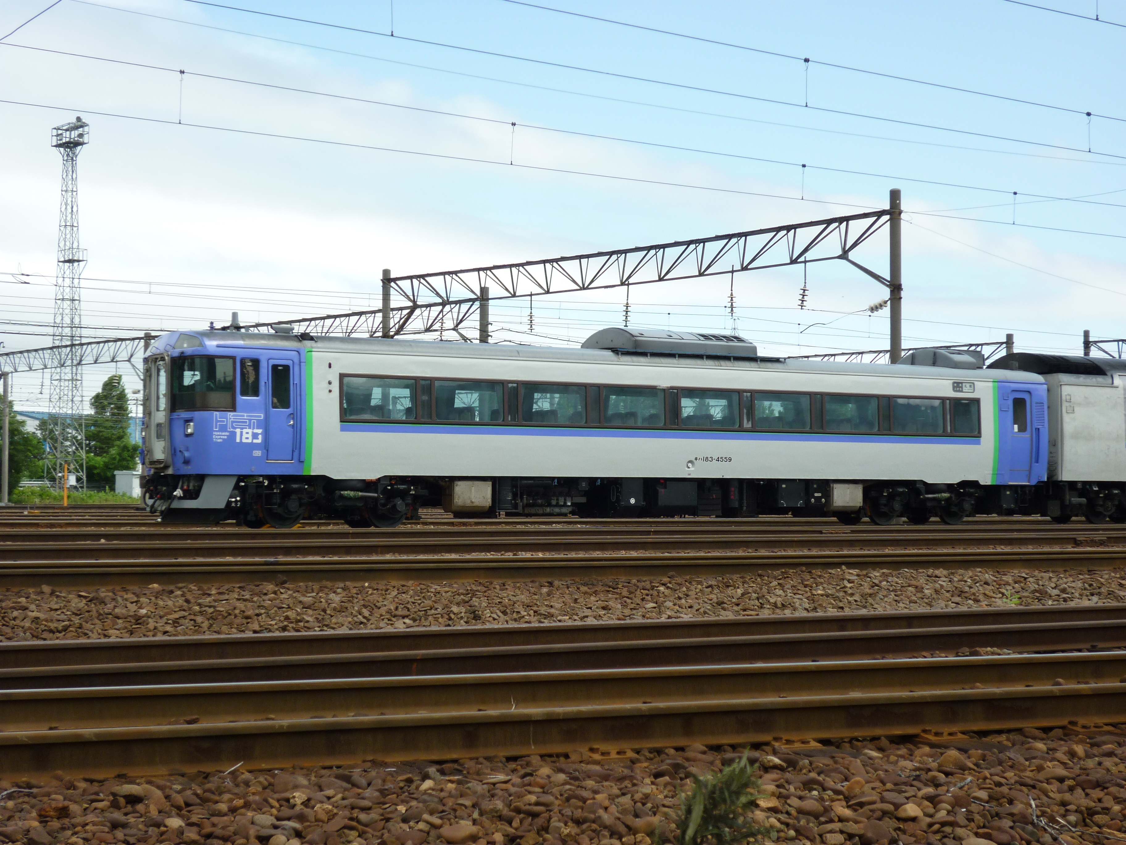 JR北海道キハ183形気動車（キハ183-4559）